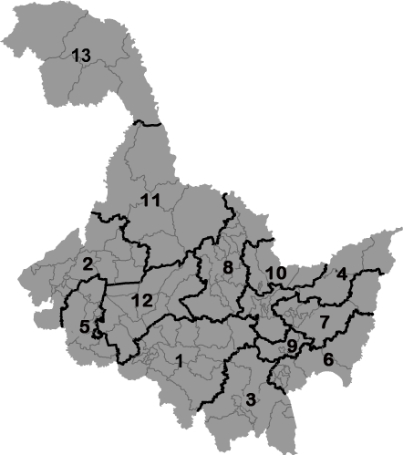 中文（中国大陆）: 黑龙江省行政区划